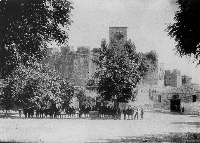 Το Ρολόι και το Κάστρο της Άρτας, Ιδιωτική συλλογή Β.Μπανταλούκα.